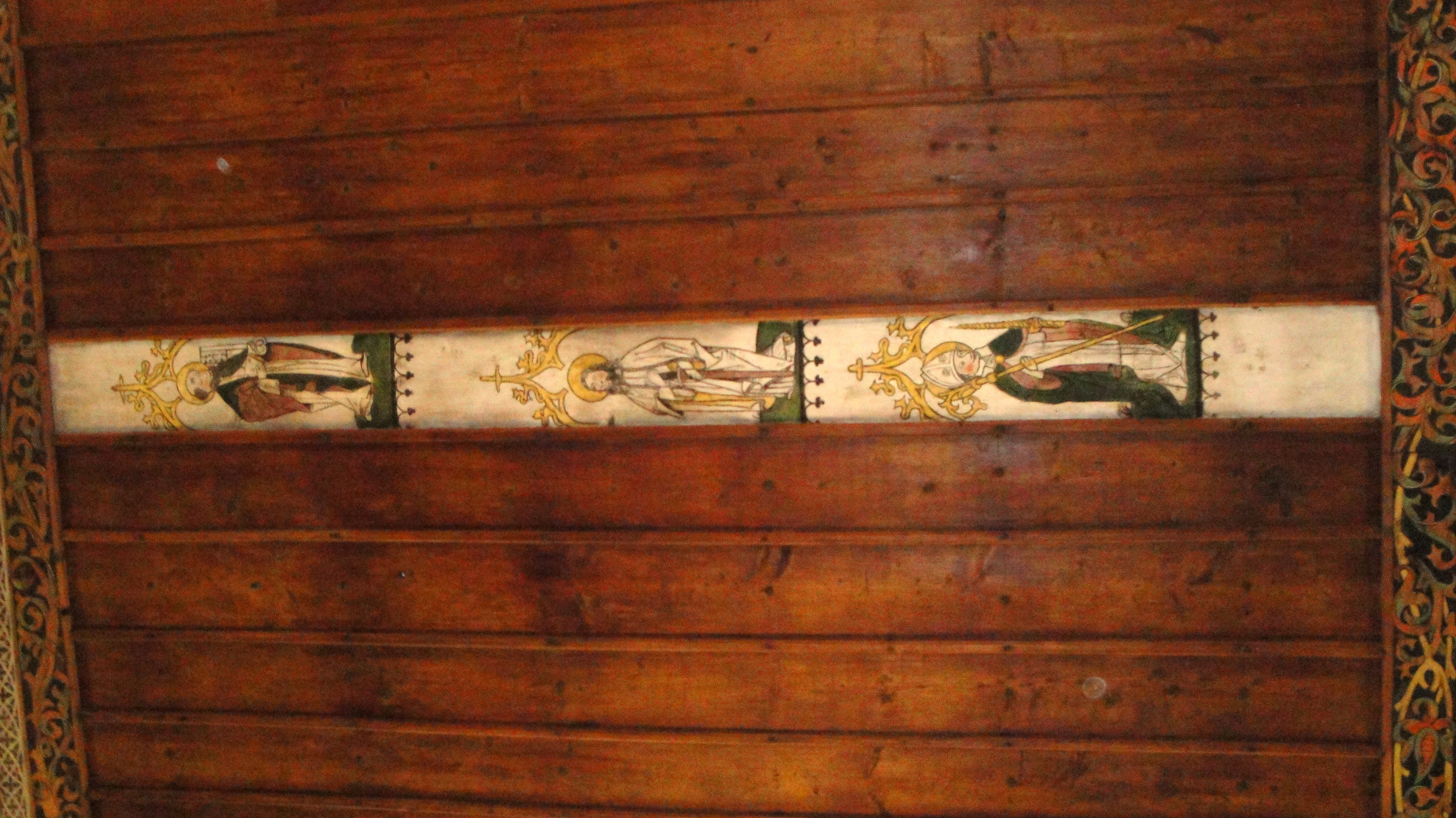 Köniz, Kirche der ehemaligen Komturei, Deckenansicht